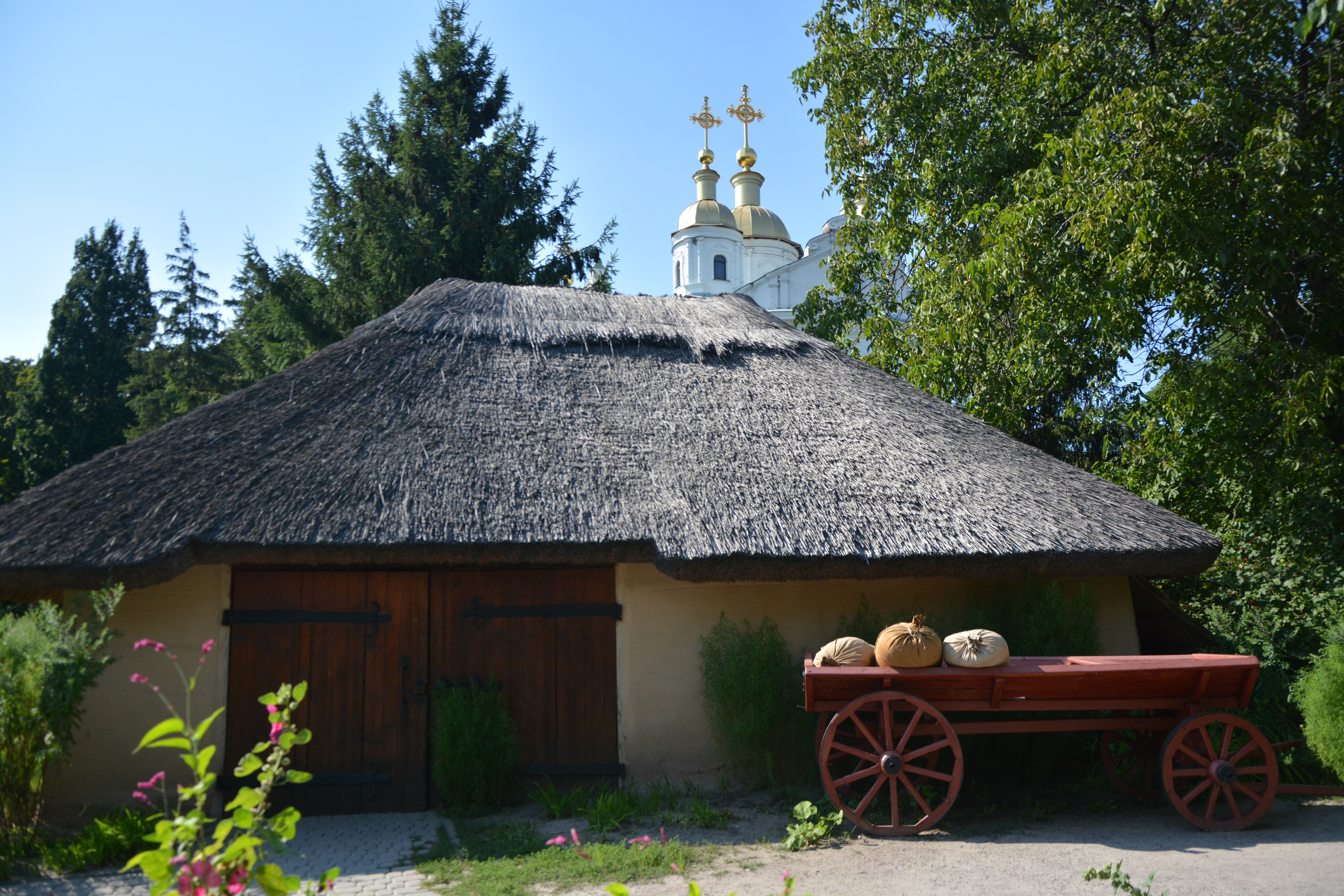 Комора (Музей-садиба Івана Котляревського), Полтава, Соборна площа, 3